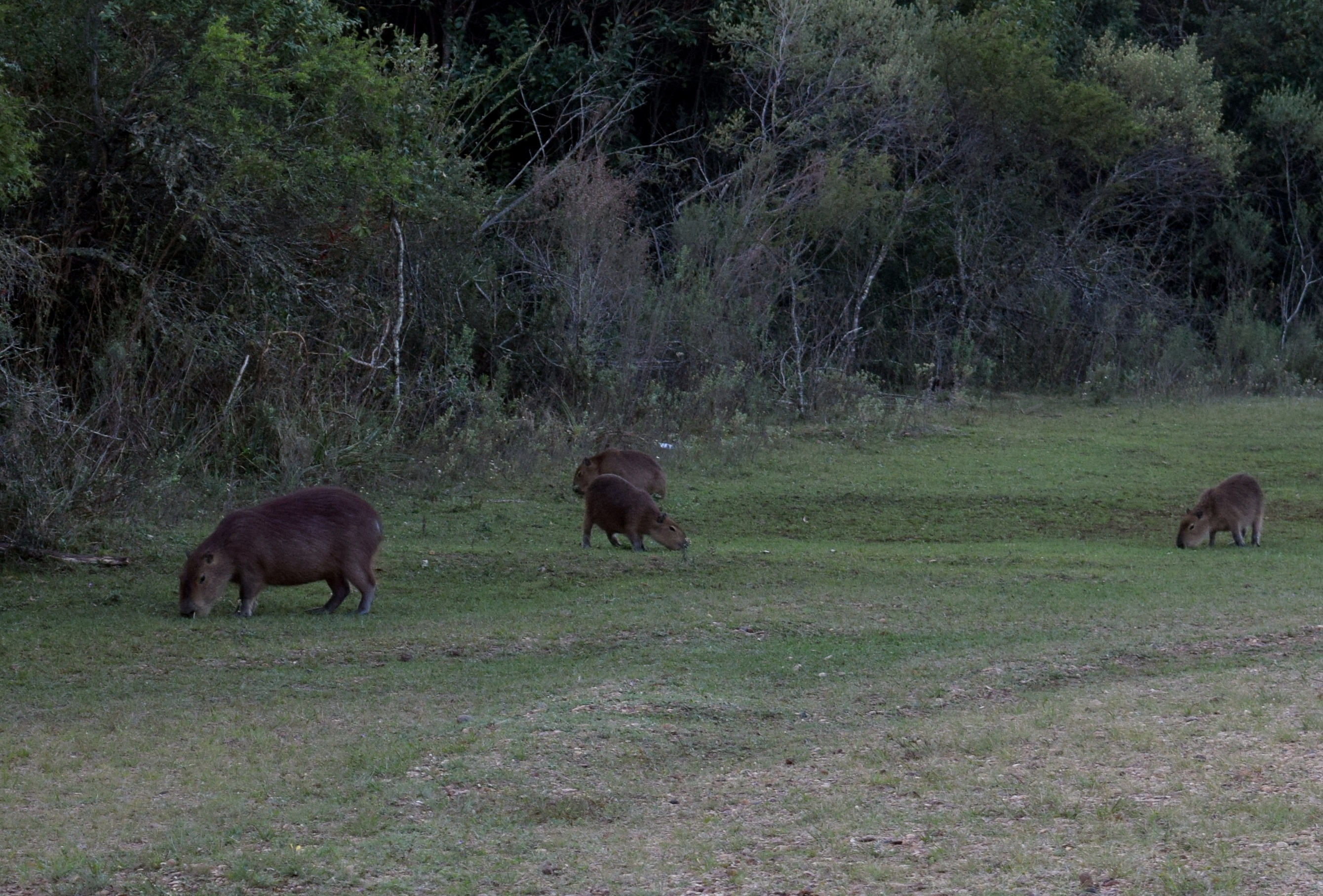 Carpinchos dentro del Parque Nacional El Palamar, Entre Ríos.